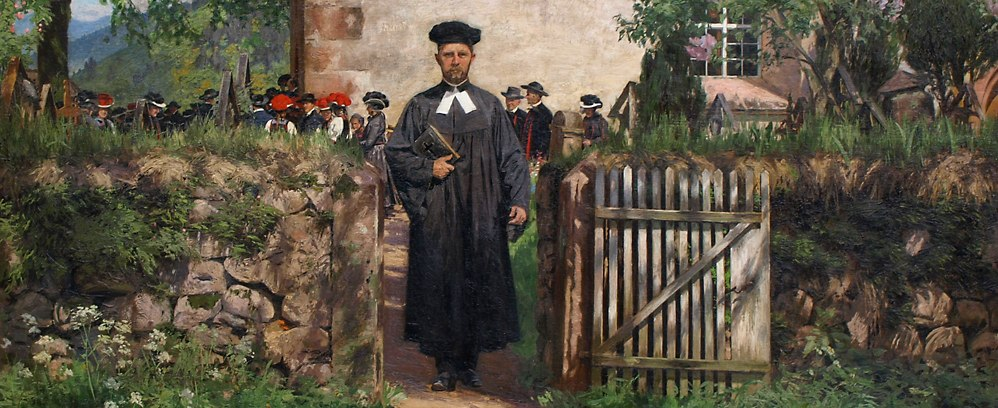 Pfarrer Richard Nutzinger von Curt Liebich. Nutzinger war Pfarrer in Gutach.